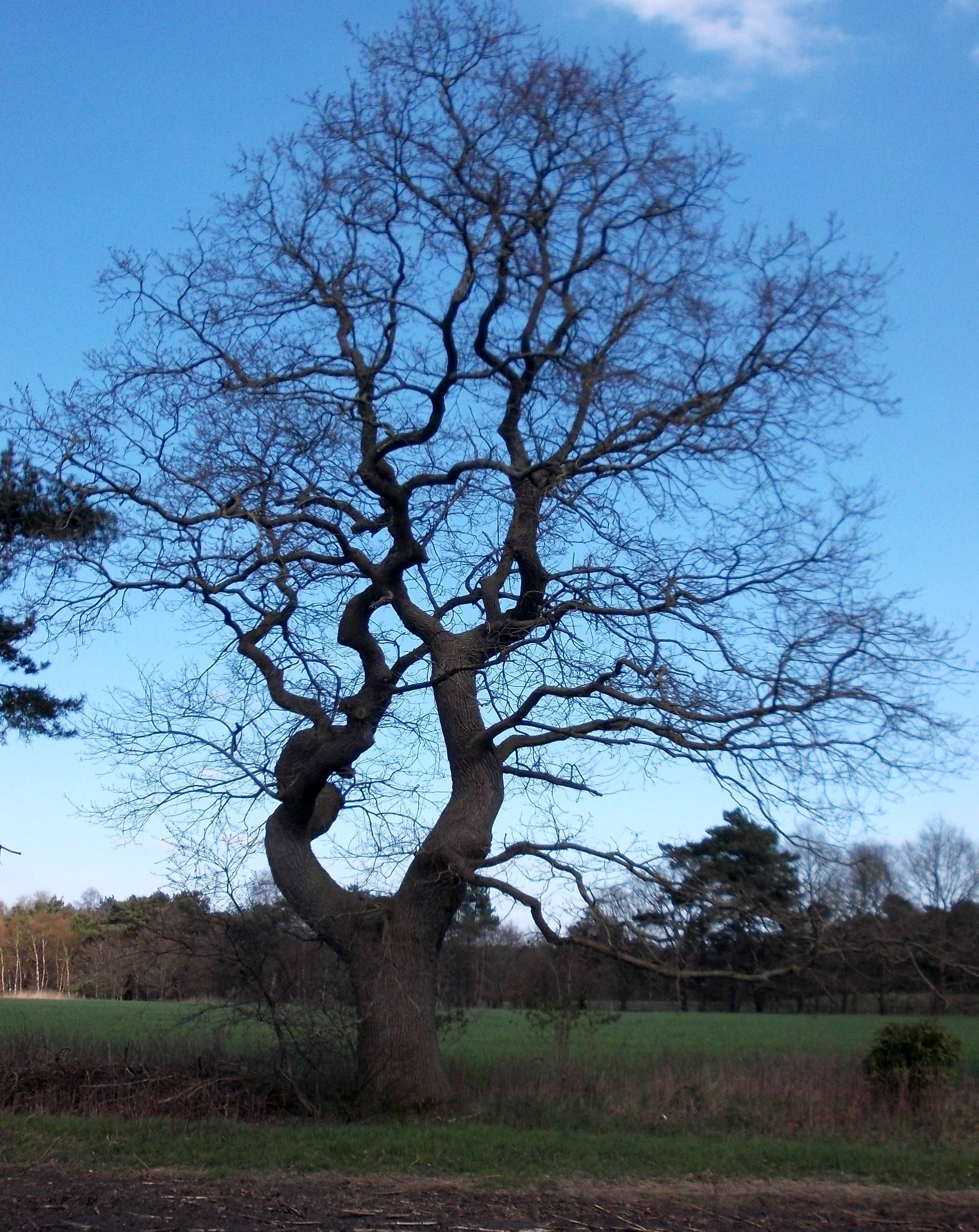 Pesteiche in Hollen, Naturdenkmal im Landkreis Cuxhaven, Niedersachsen